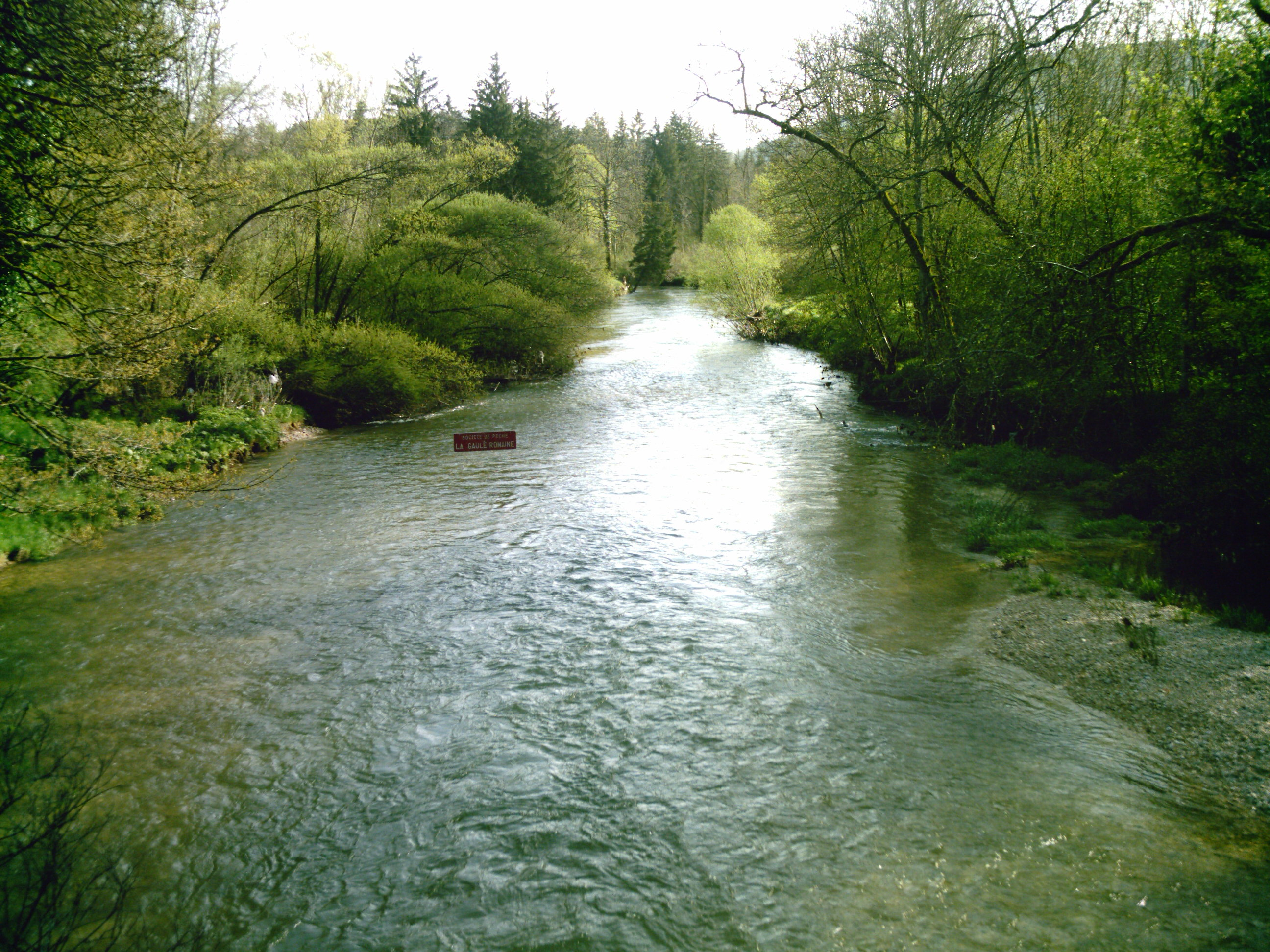 L'Oignin depuis le pont sur la D979 (limite de la société de pêche "La Gaule romaine")